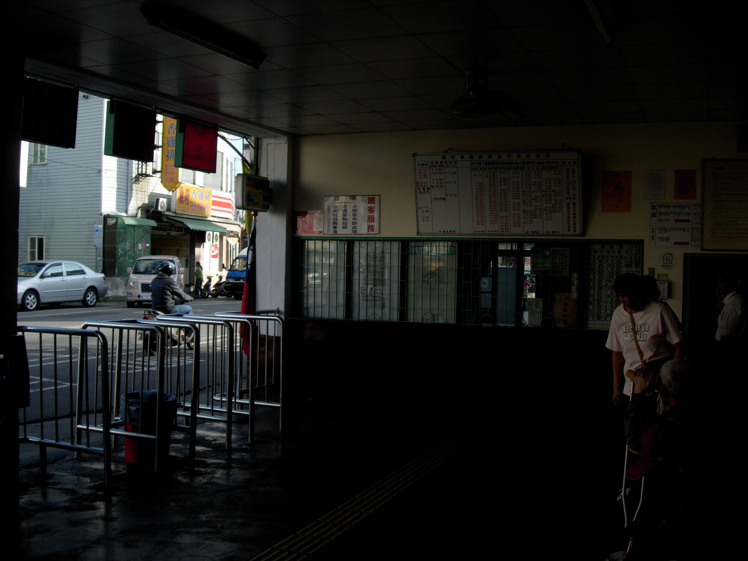 中文（台灣）: 新竹客運龍潭站內部